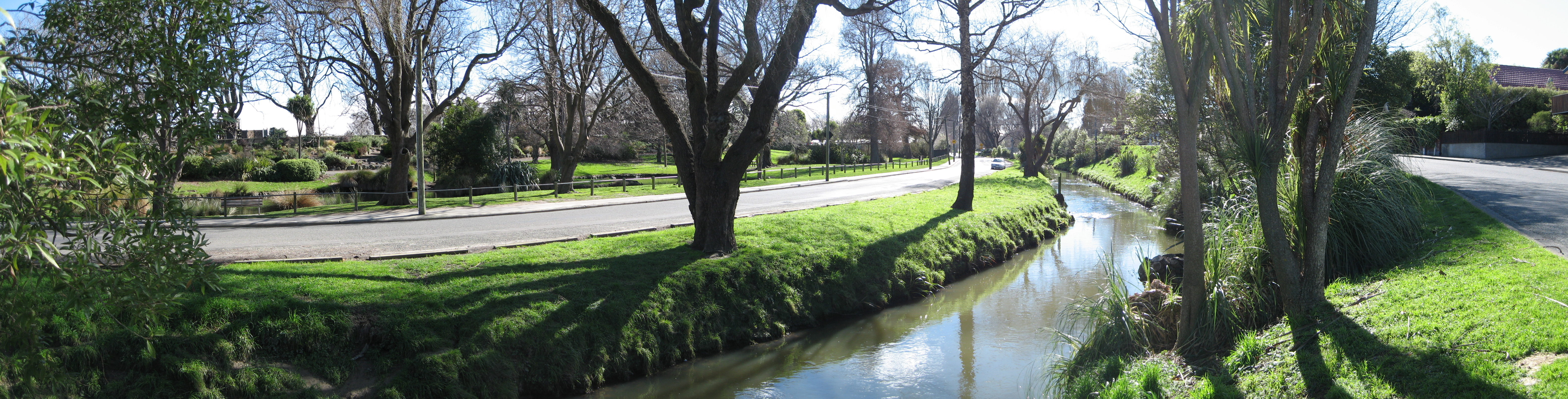 Heathcote River, Beckenham, Christchurch, New Zealand